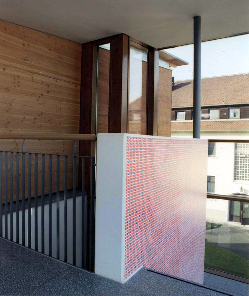 Wohnheim für Stipendiaten aus Entwicklungsländern, Groß-Gerau. Wandgestaltung von Saskia Schüler, Lackstifte auf grundierte Betonwand